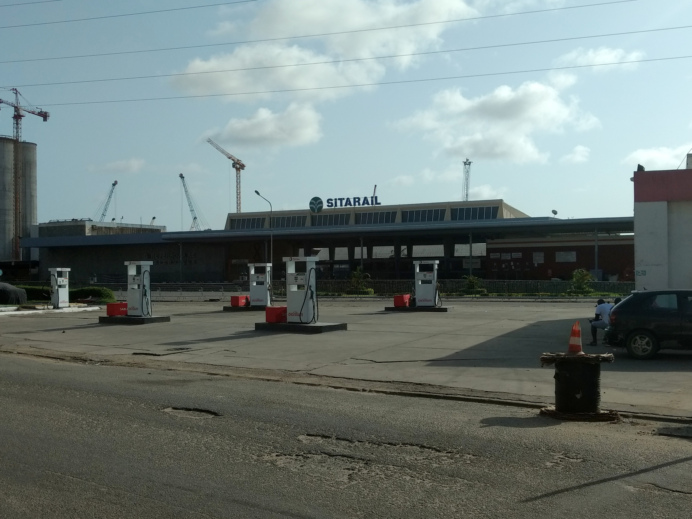 Bahnhof Treichville